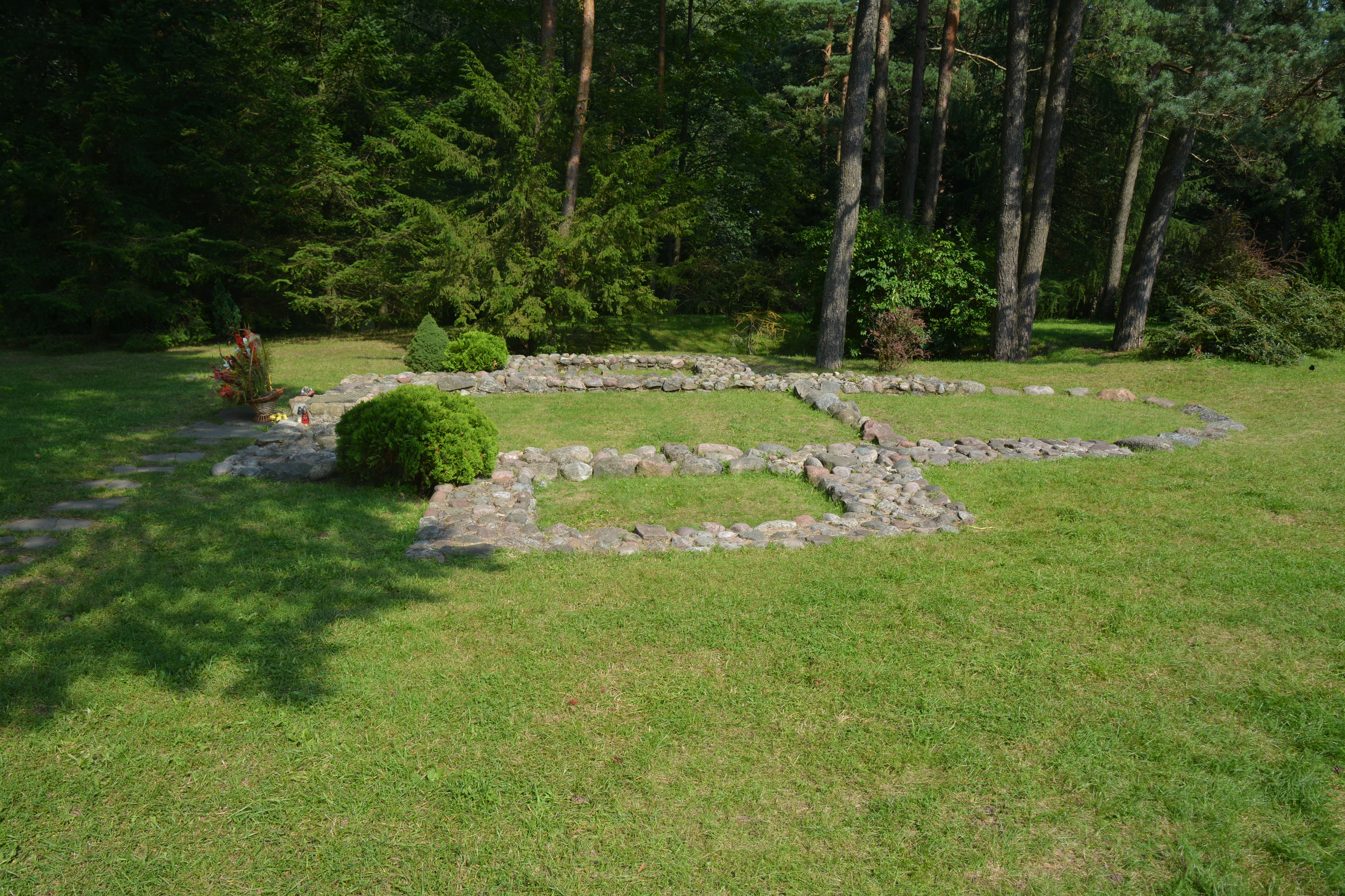 Góra Chełmska. Kamienne fundamenty kaplicy z początku XIII w.